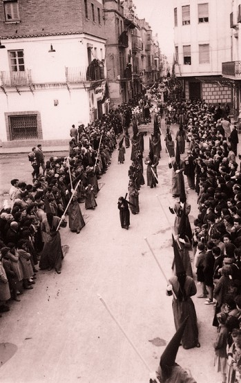 La Hermandad en una procesión durante los años 50 (Foto: R.Escrig)